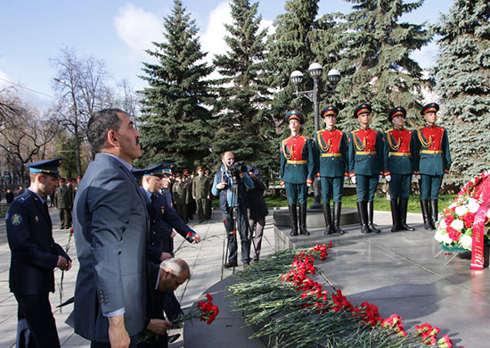 Глава Республики Ингушетия Герой России Юнус-Бек Евкуров на возложении цветов к памятнику первому главнокомандующему Сухопутными войсками Маршалу Советского Союза Георгию Жукову перед штабом ЦВО в Екатеринбурге